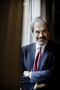 Claudio Costamagna